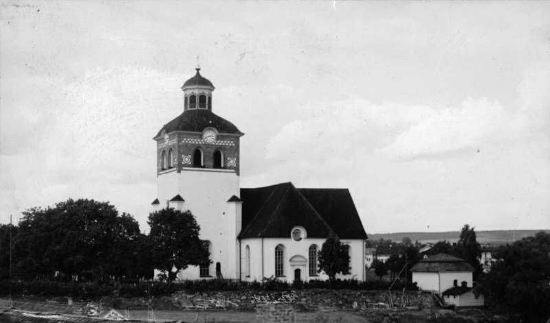 Kyrkan från söder. Kategori: (01) ExteriörerKyrkan från söder.